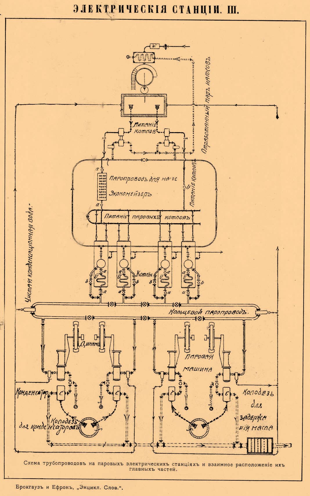 Иллюстрация к статье Электрические станции из энциклопедии Брокгауза и Ефрона